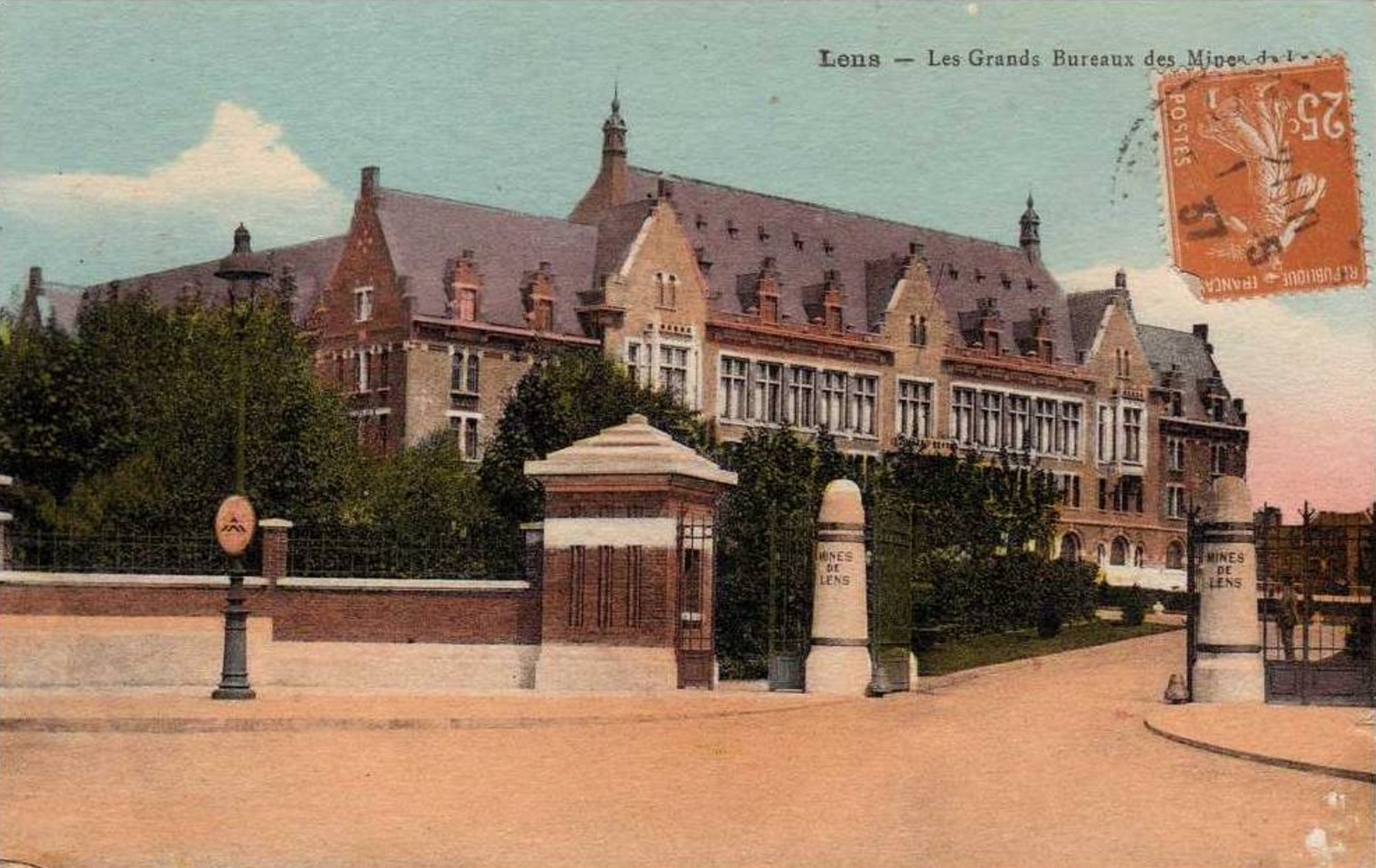 Grands bureaux de la Compagnie des mines de Lens dans le bassin minier du Nord-Pas-de-Calais, actuelle faculté des sciences Jean Perrin (Université d'Artois), Lens, Pas-de-Calais, Nord-Pas-de-Calais, France. Les Grands bureaux sont inscrits aux monuments historiques le 1er décembre 2009 et inscrits sur la liste du patrimoine mondial de l'Unesco le 30 juin 2012 et y constituent le site no 64.